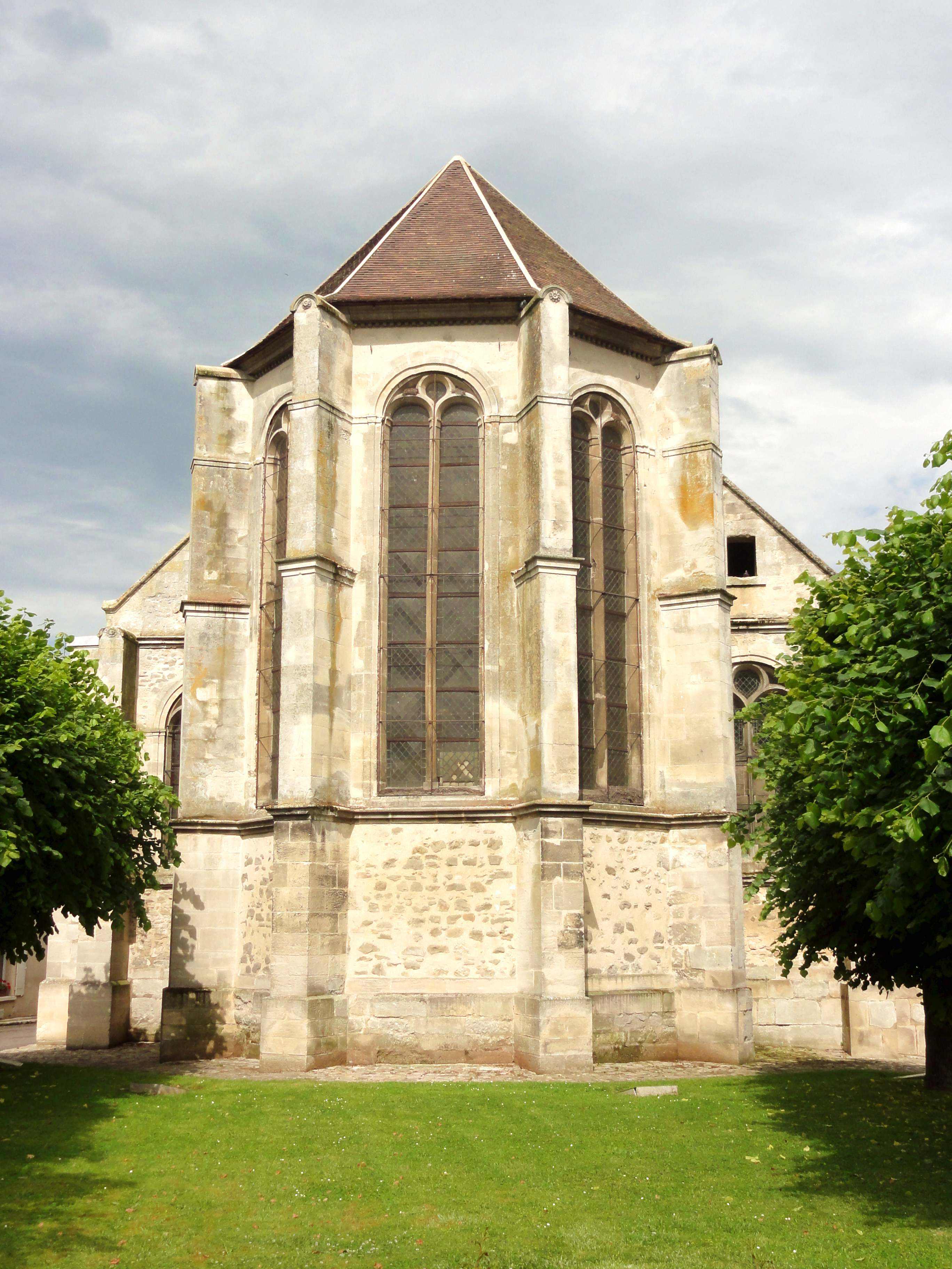 Le chœur.